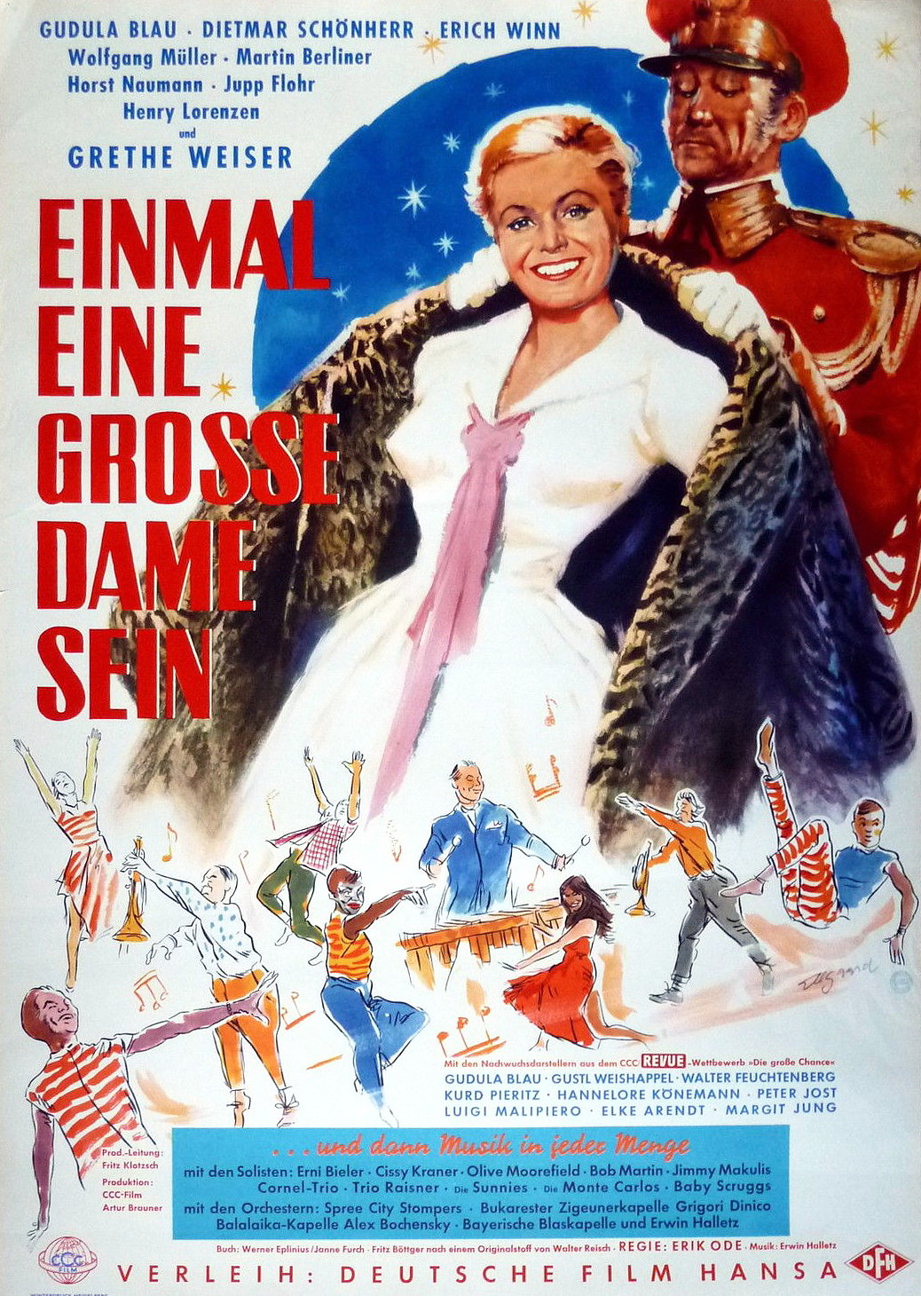 "Einmal eine große Dame sein" (1957), deutsche Filmkomödie von Erik Ode mit Gudula Blau und Dietmar Schönherr